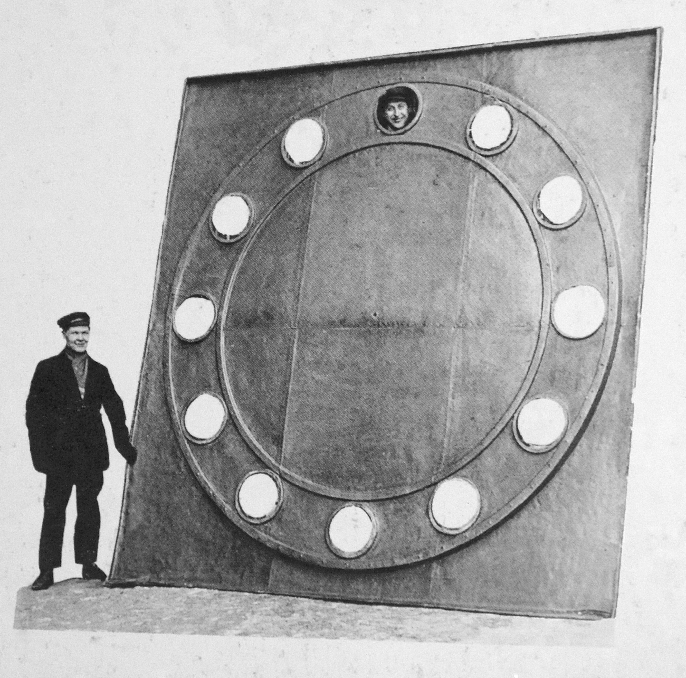 Helsingin rautatieaseman kellotaulu. 1922